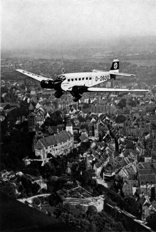 Mit der D-2600 über Nürnberg. Ankunft auf dem Reichsparteitag 1934